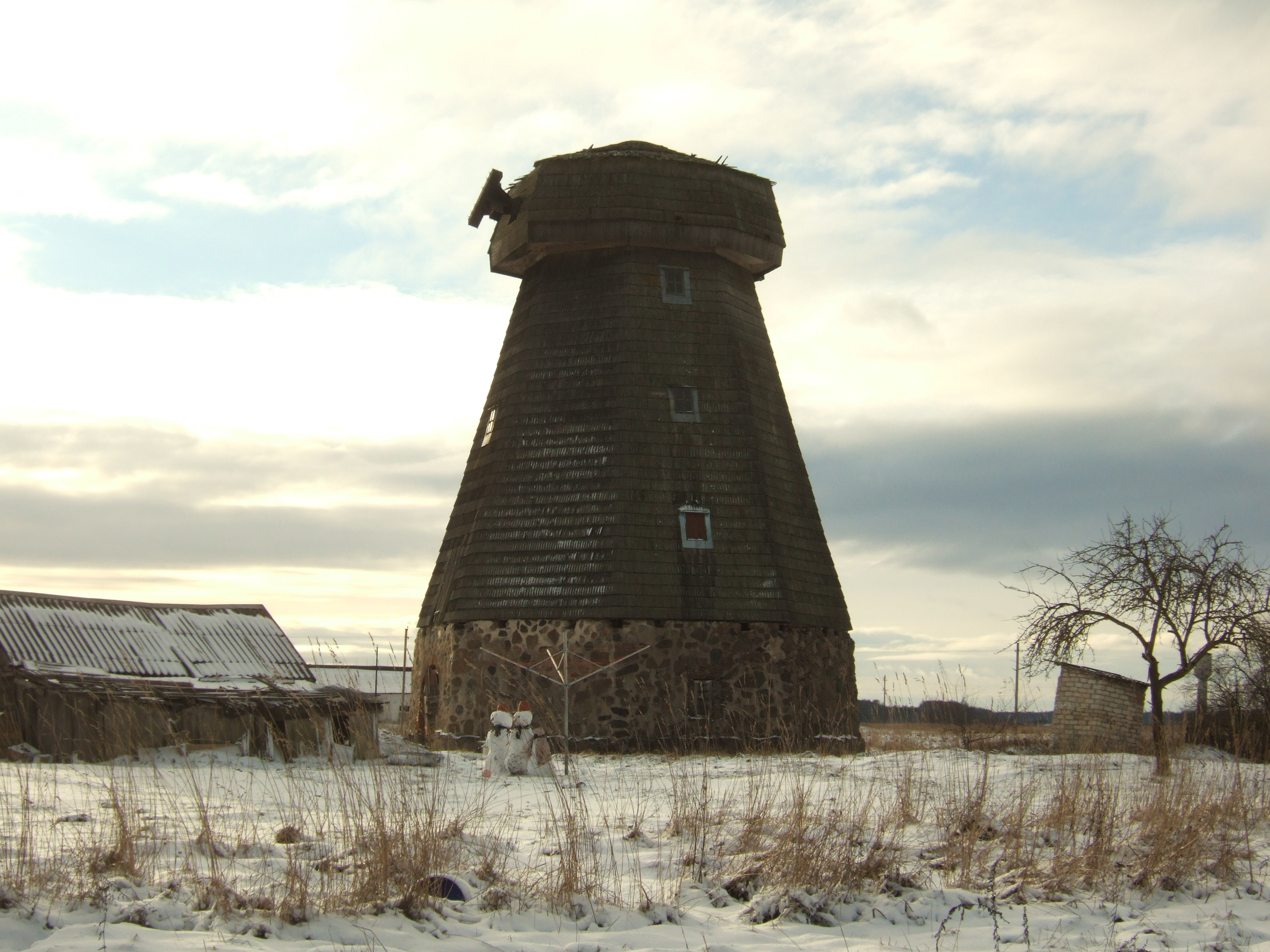 Vėjo malūnas Radviliškyje, kovų su bermontininkais liudininkas.